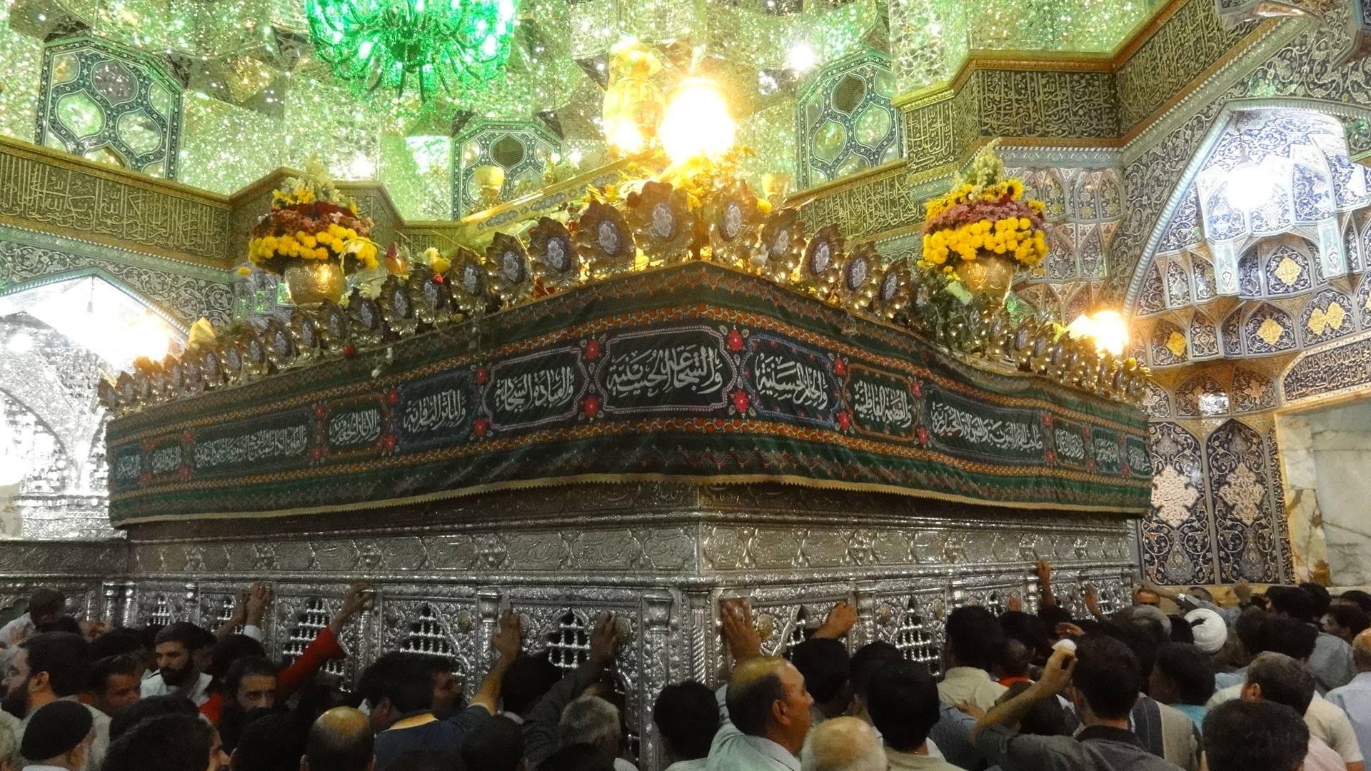 حرم حضرت معصومه سلام الله علیها